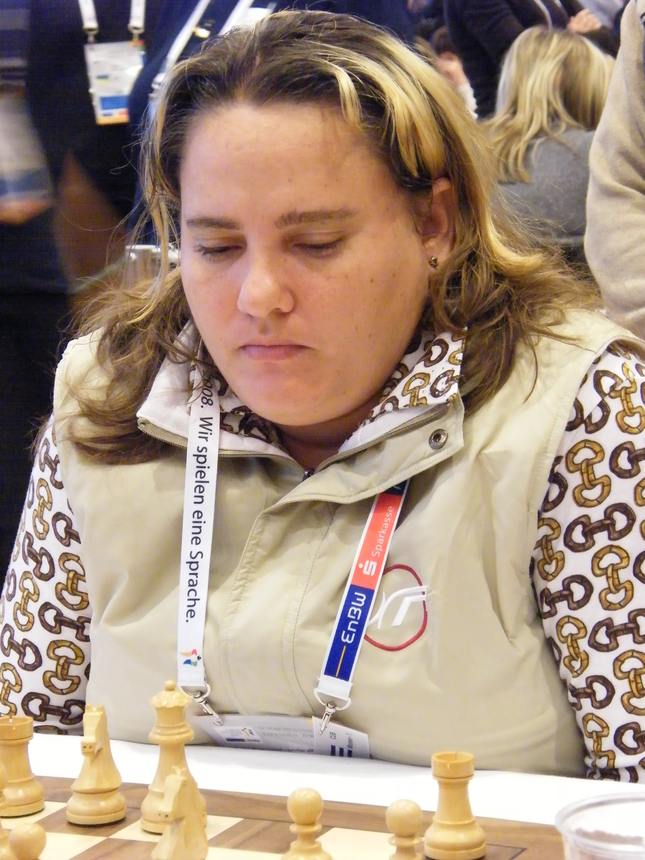 Maritza Arribas Robaina bei der 38. Schacholympiade in Dresden 2008